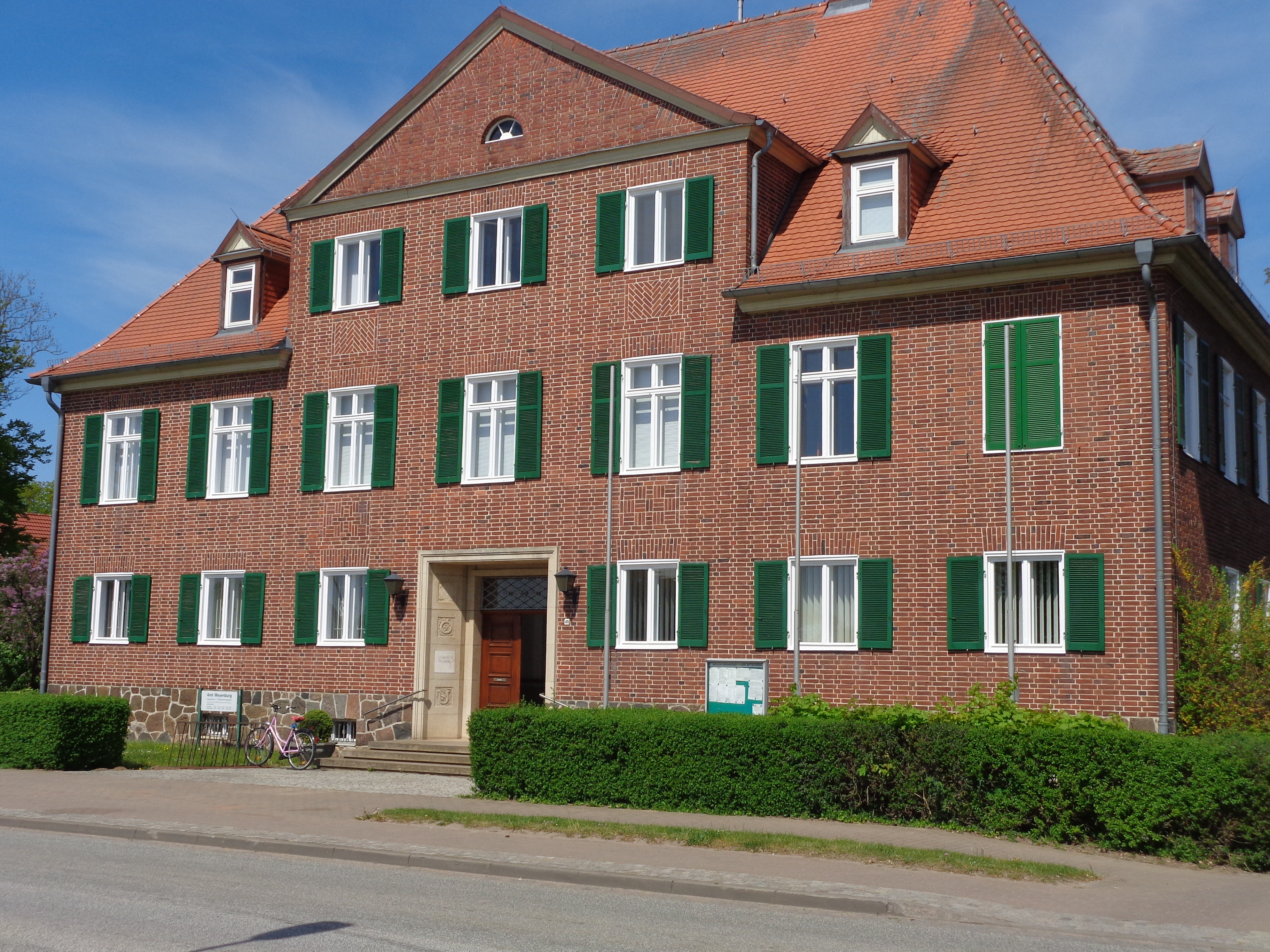 Gebäude des Amtes Meyenburg.